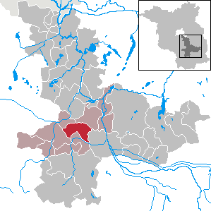 Schönwald in Brandenburg (Country) - District Dahme-Spreewald